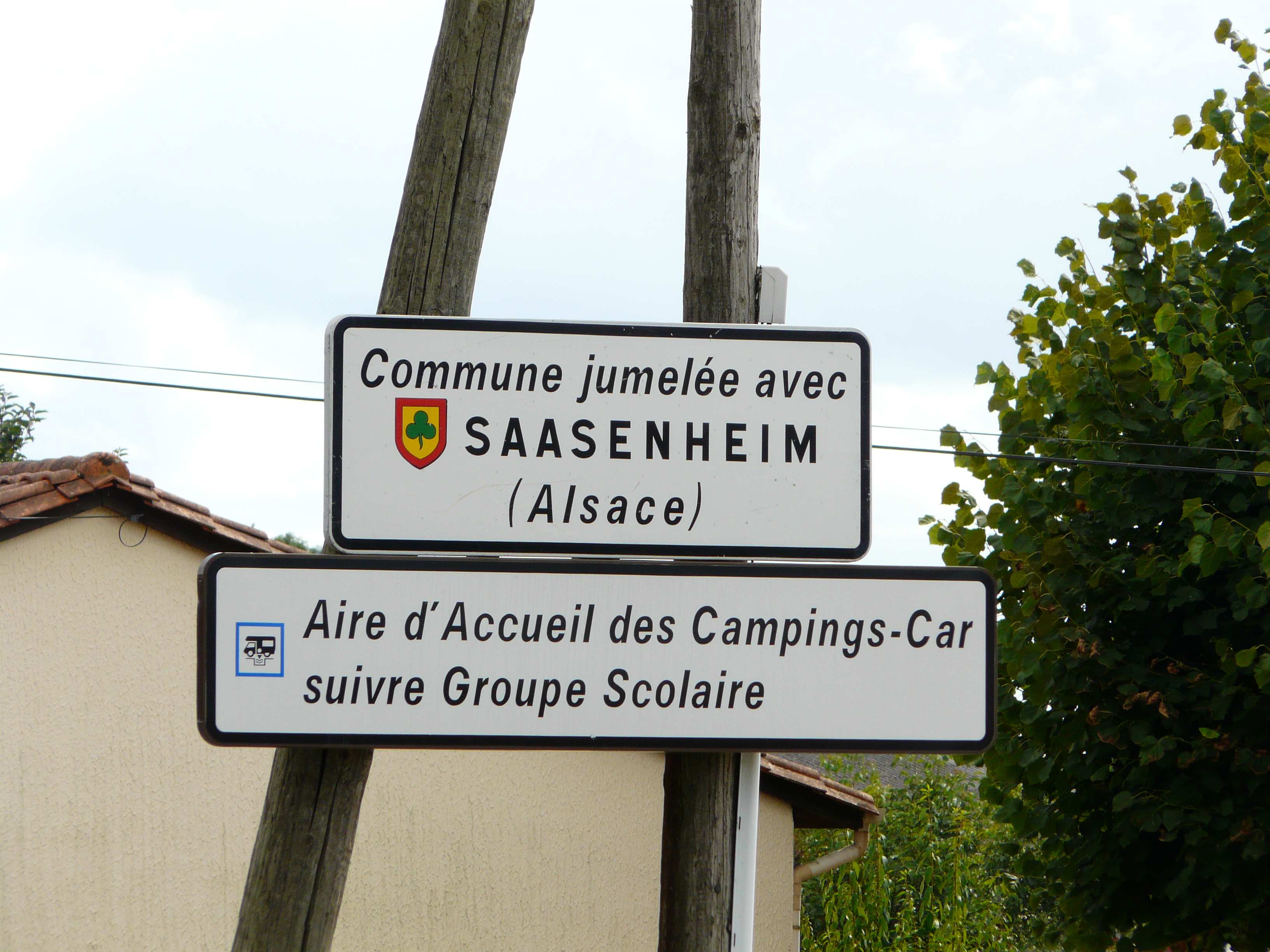 Panneau de jumelage de Salignac-Eyvigues, Dordogne, France.